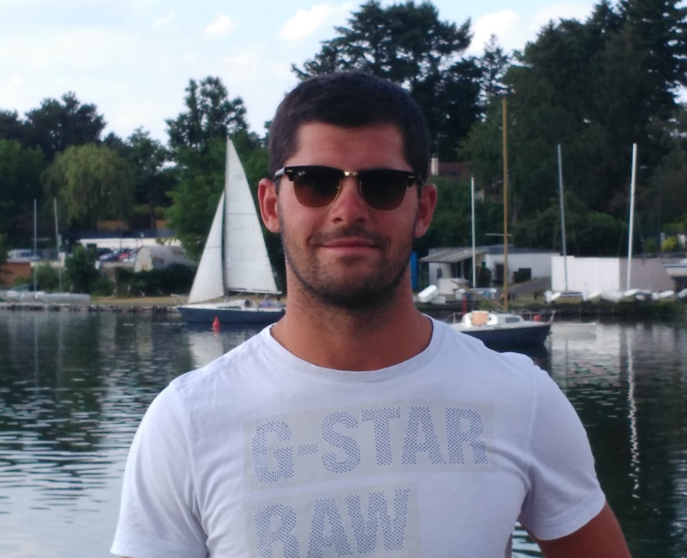 à l'Aviron Majolan